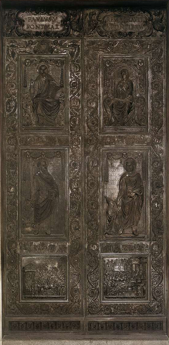 FILARETE Bronze door Bronze Basilica di San Pietro, Vatican